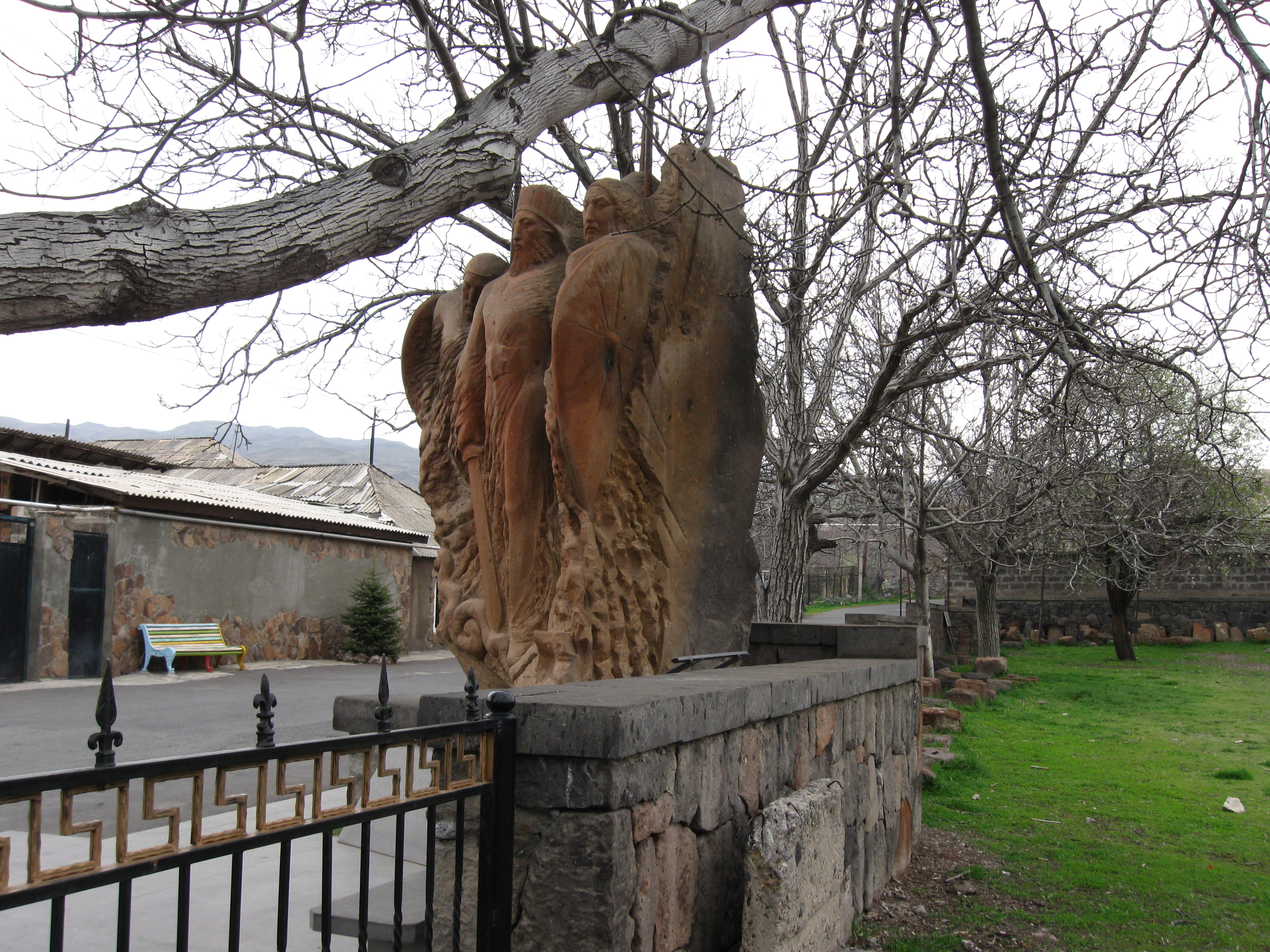 Արշակունիներ